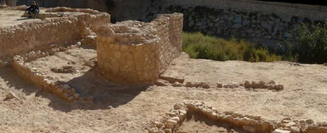 Restos arqueológicos del Castillo del Aljau de Aspe